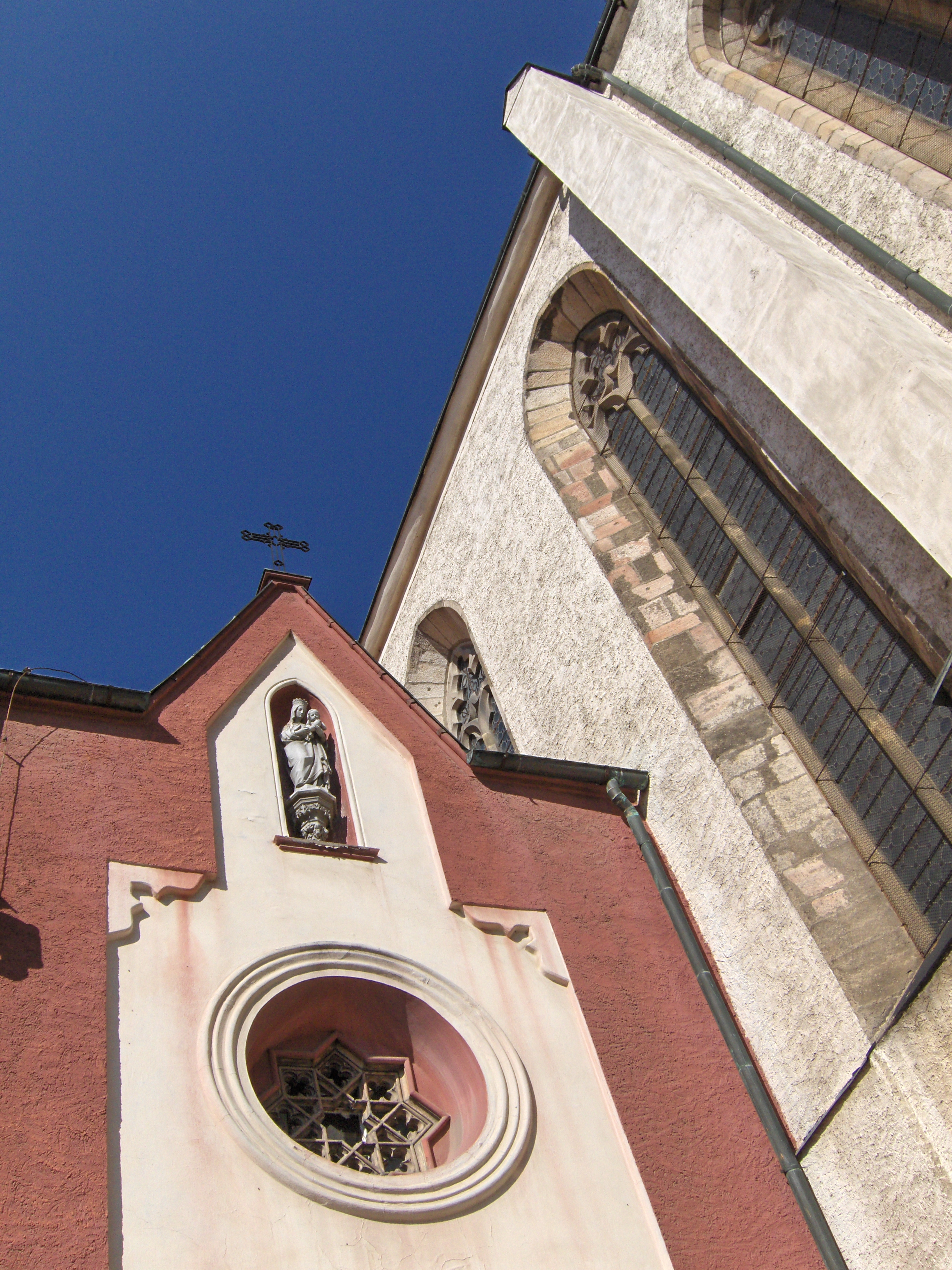 Kostel Obětování Panny Marie v Český Budějovicích a portál ambitu